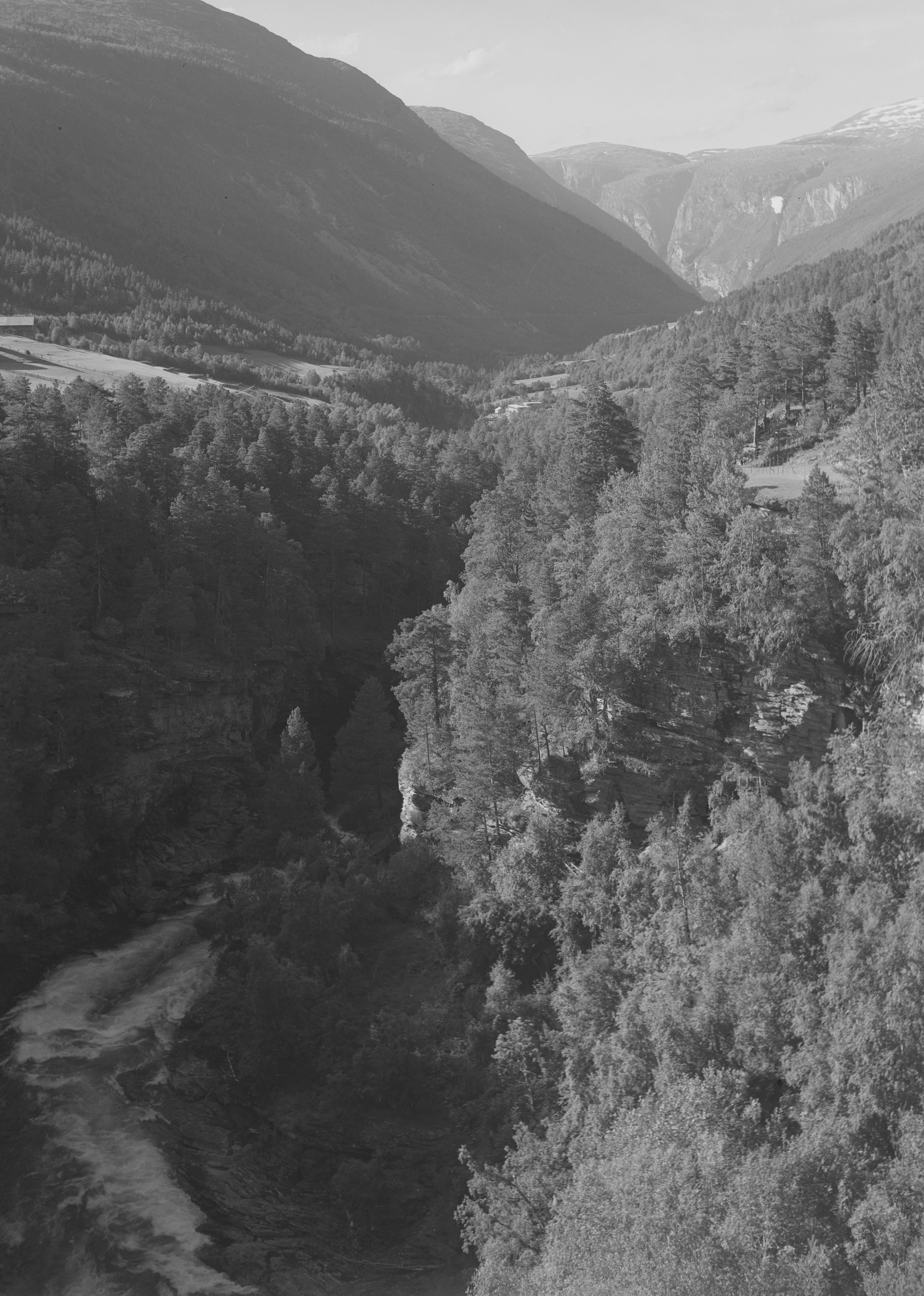 Bildet er hentet fra Nasjonalbibliotekets bildesamling. Anmerkninger til bildet var: Fotograf : ukjent Romsdalen,Verma, Rauma, Møre og Romsdal